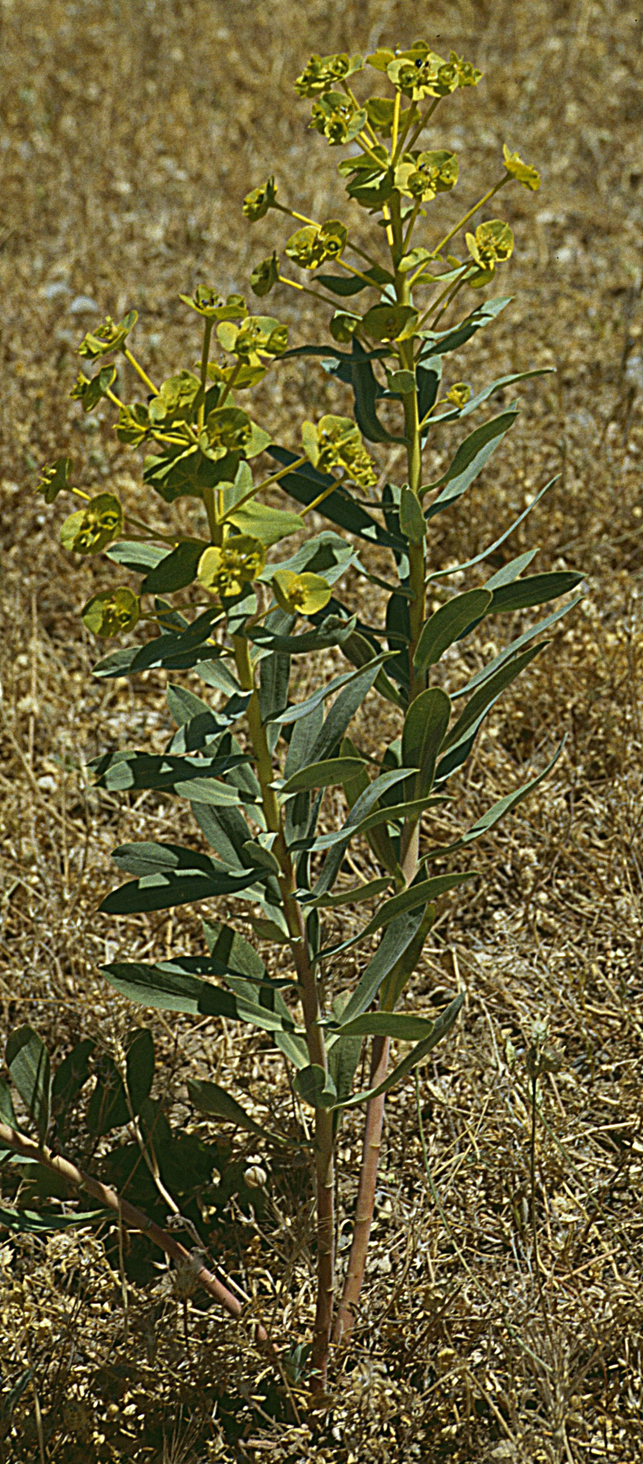 Euphorbia biumbellata Poiret in Ostanatolien